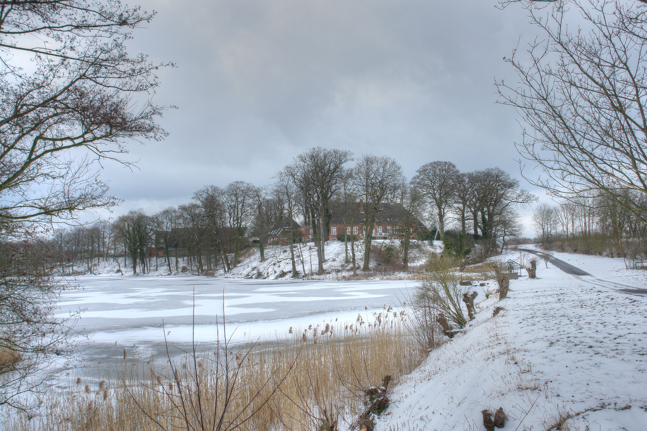 Gut Eckhof, Dänischenhagener Straße: Seeseite